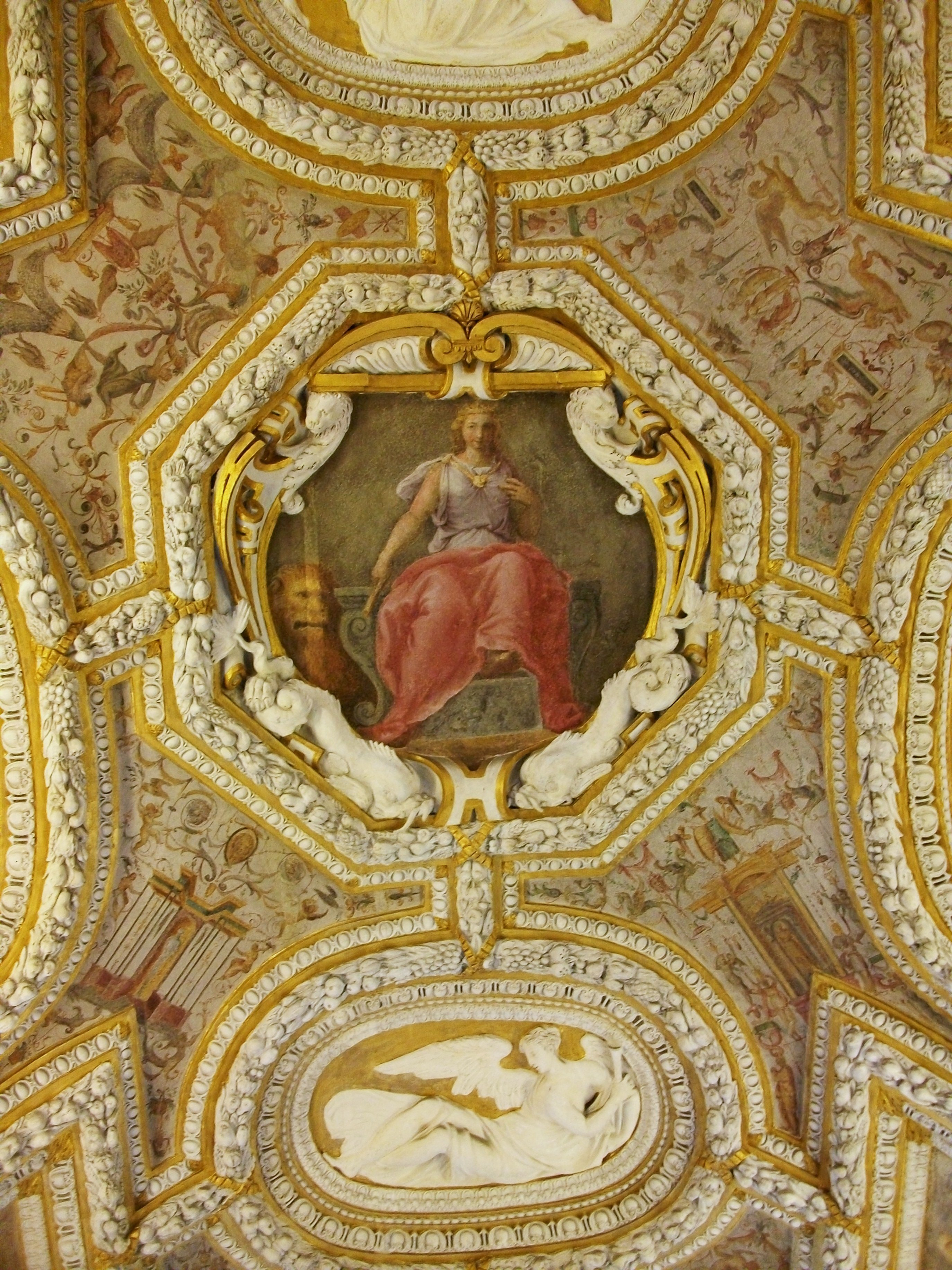 Detall de l'Escala d'Or (Scala d'Oro) del Palau Ducal de Venècia.